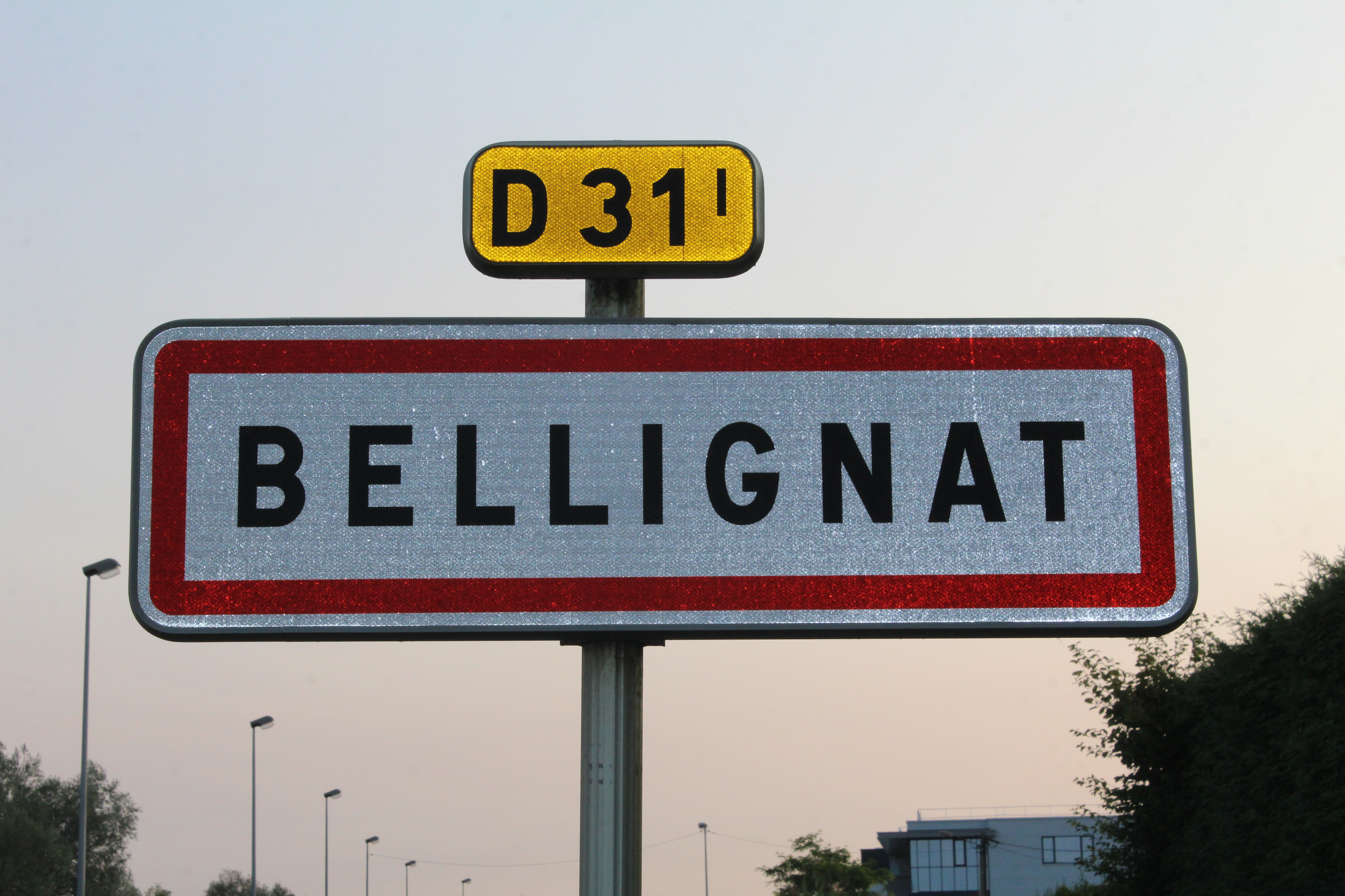 Panneau d'entrée dans Bellignat.